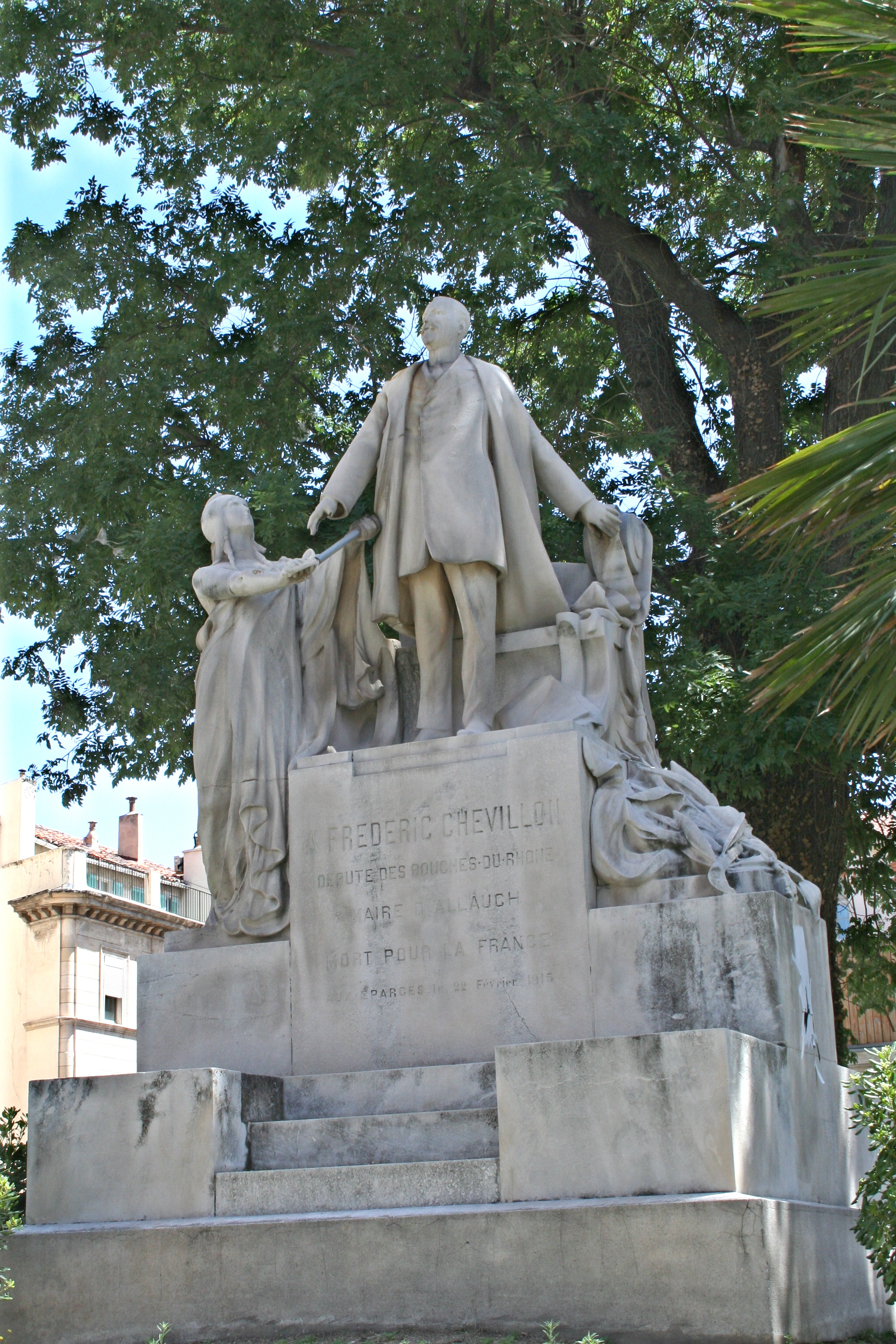 Monument en l'honneur de Frédéric Chevillon, député maire d'Allauch mort au champ dhonneur en 1917, élevé place de la corderie-Henri Bergasse à Marseille. Sculpture d'Henri Raybaud.